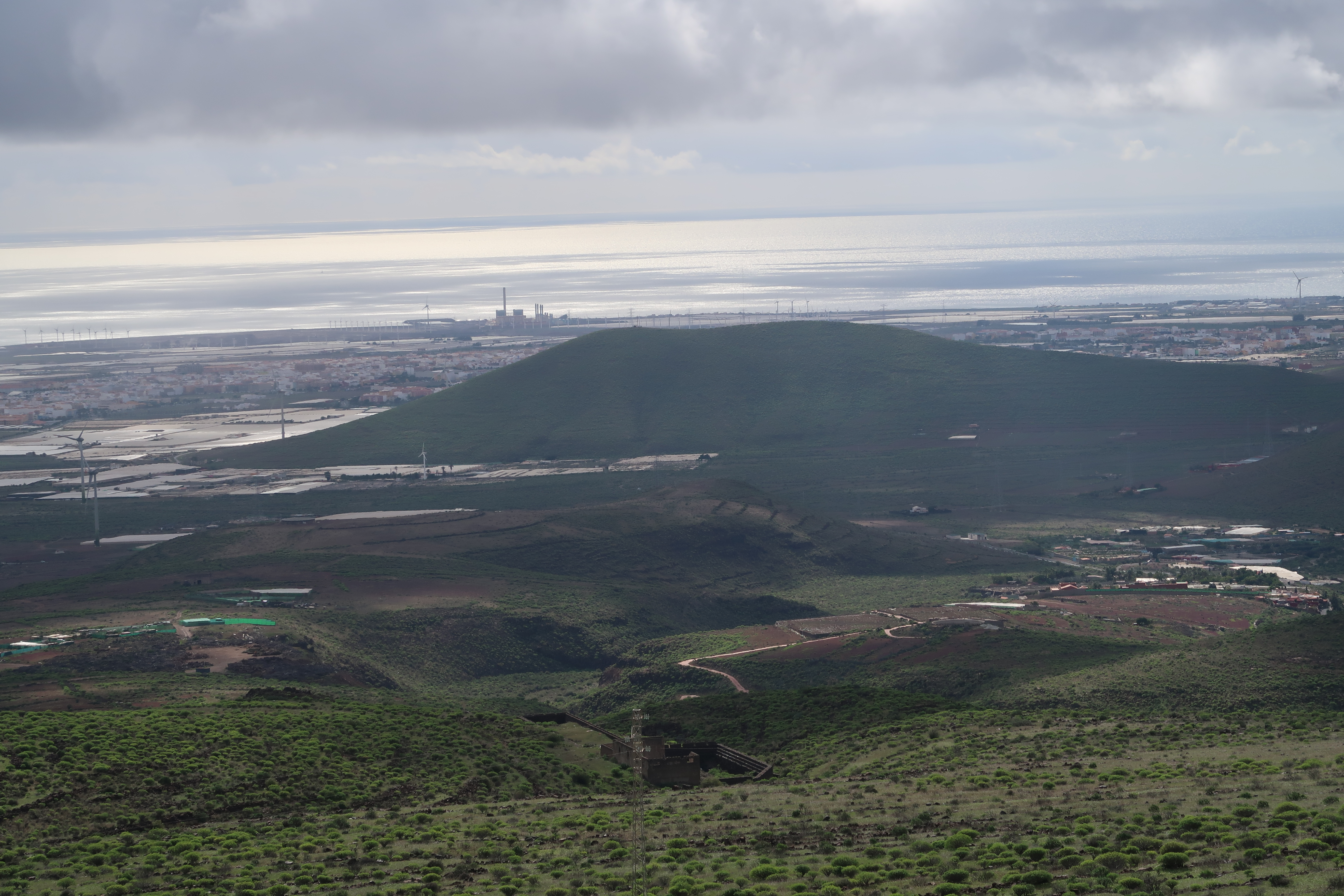 vista desde Temisas